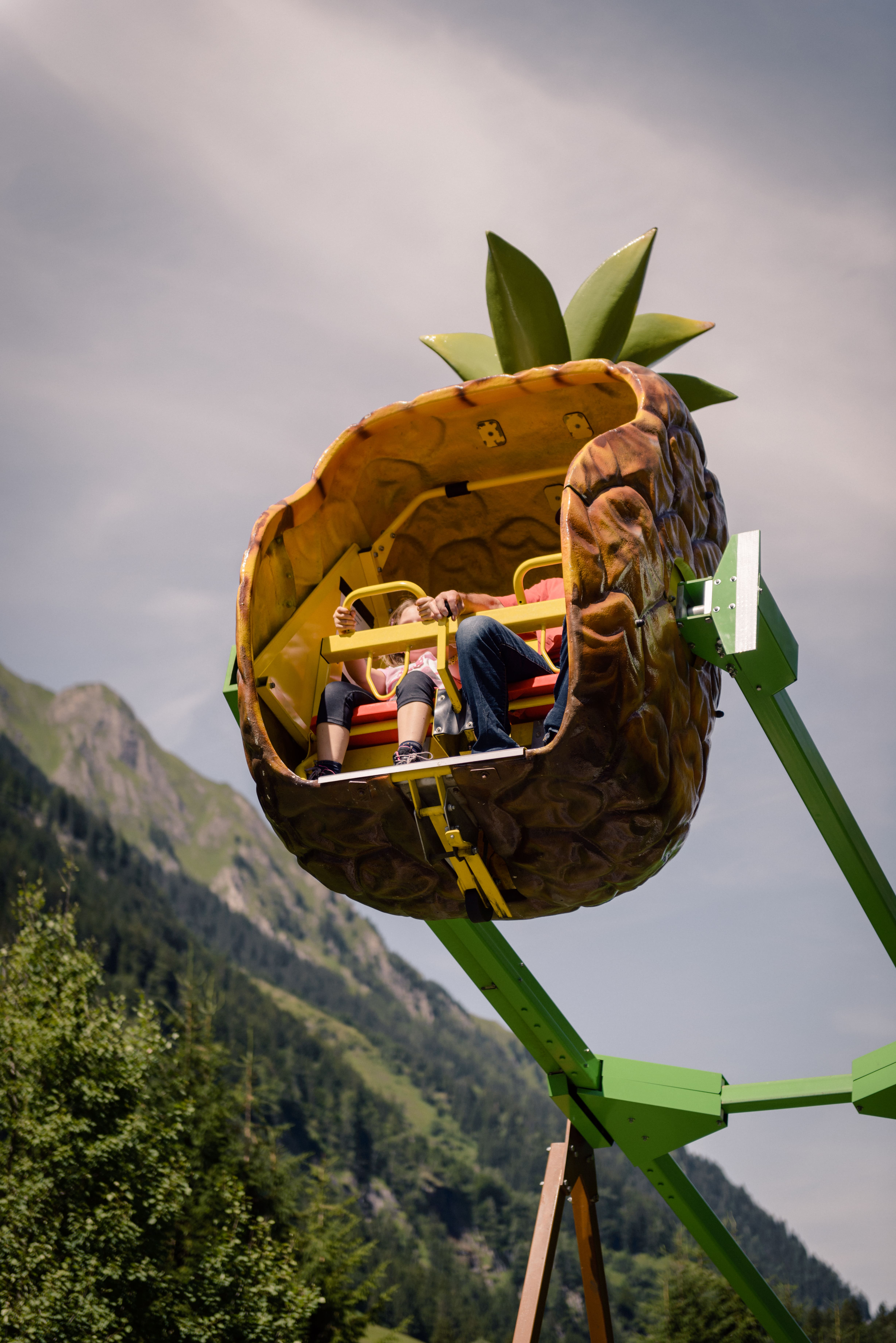 Foto selbst aufgenommen mit Einverständnis in Ferleiten